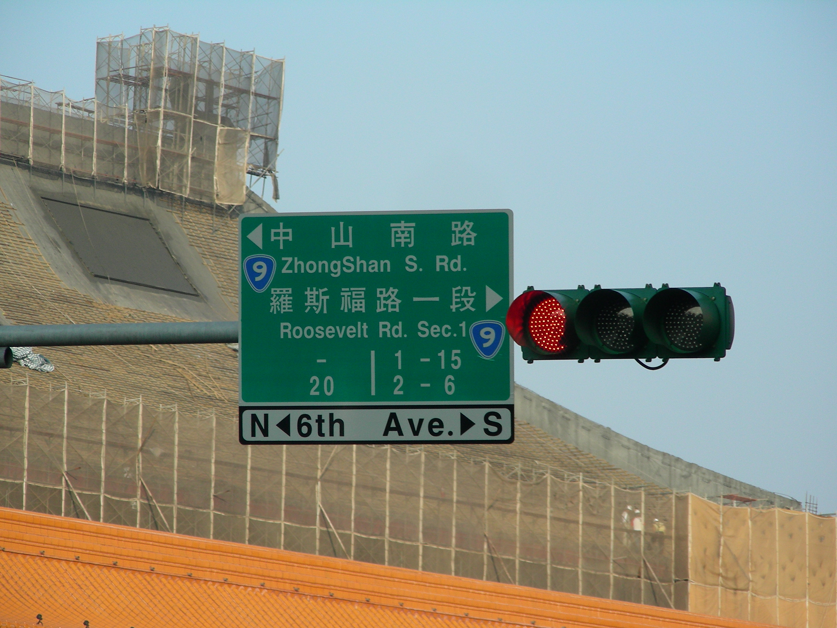 臺北市中正區中山南路、羅斯福路一段交界處路名標誌。